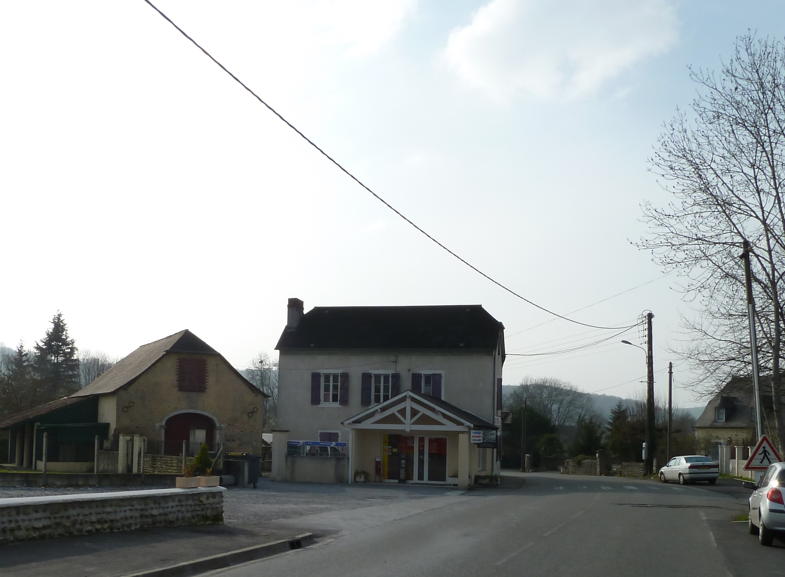 Alimentation à Artiguelouve